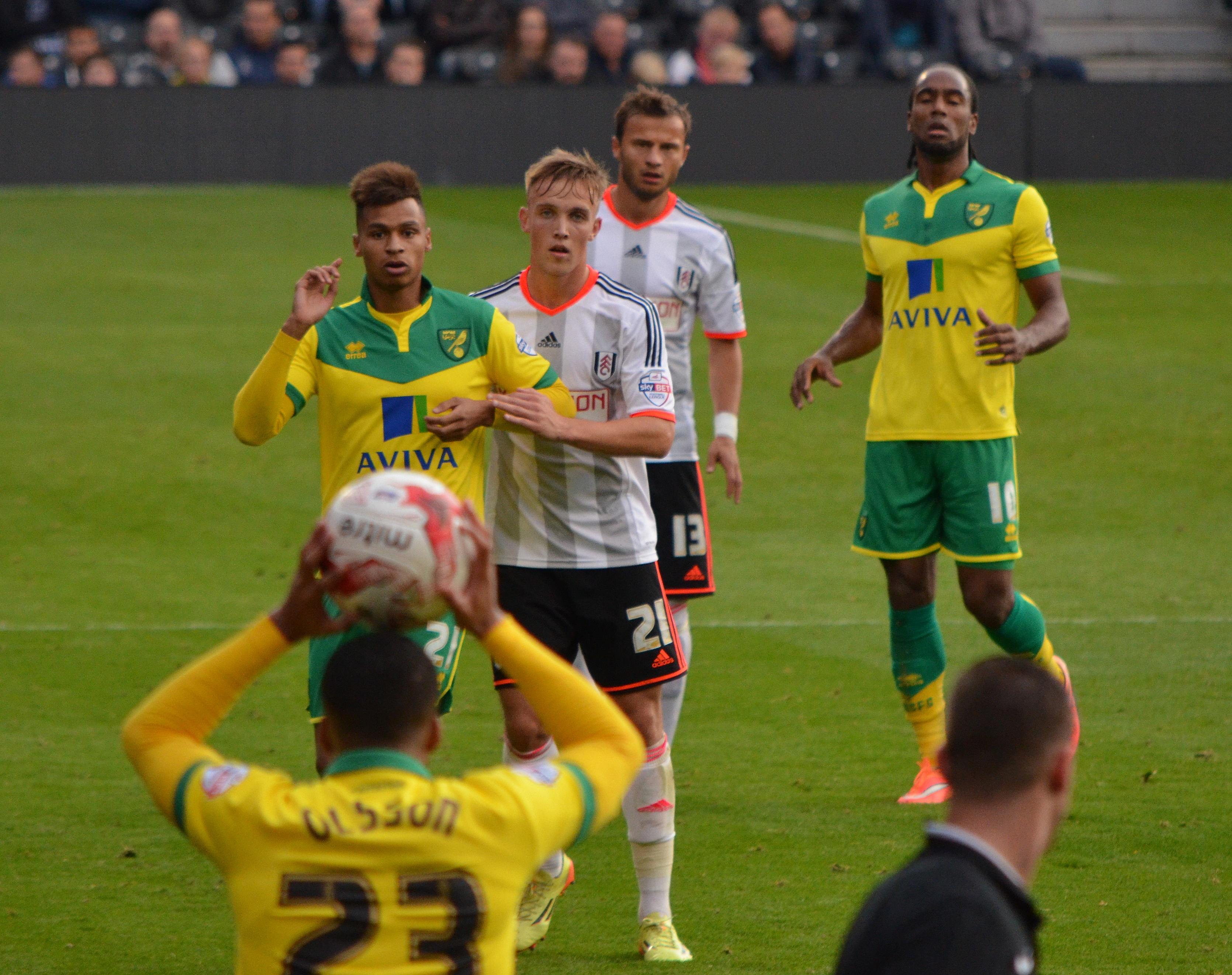 Fulham v Norwich (2014)